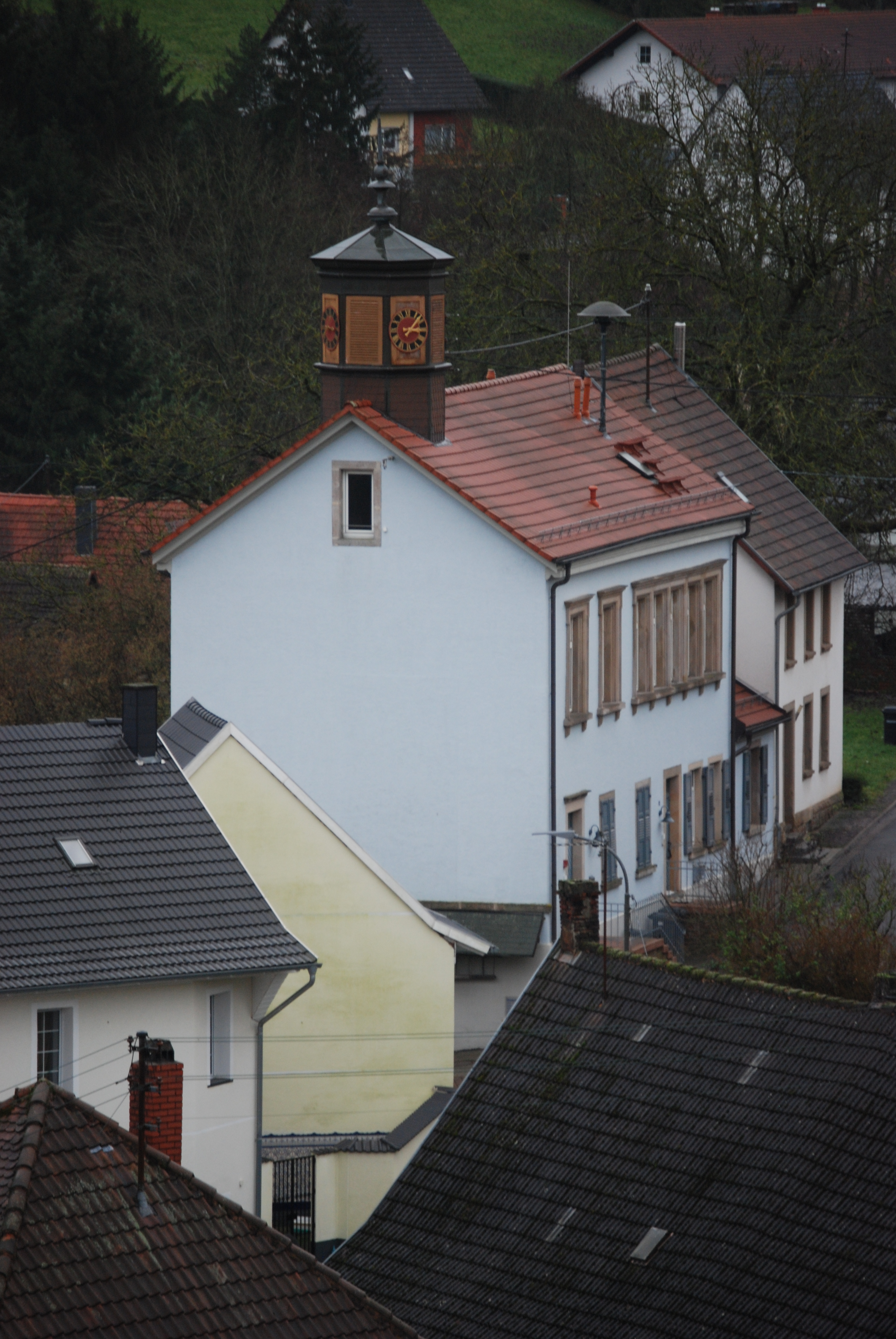 ehemaliges Schulhaus in Blaubach, Matzenberg 5